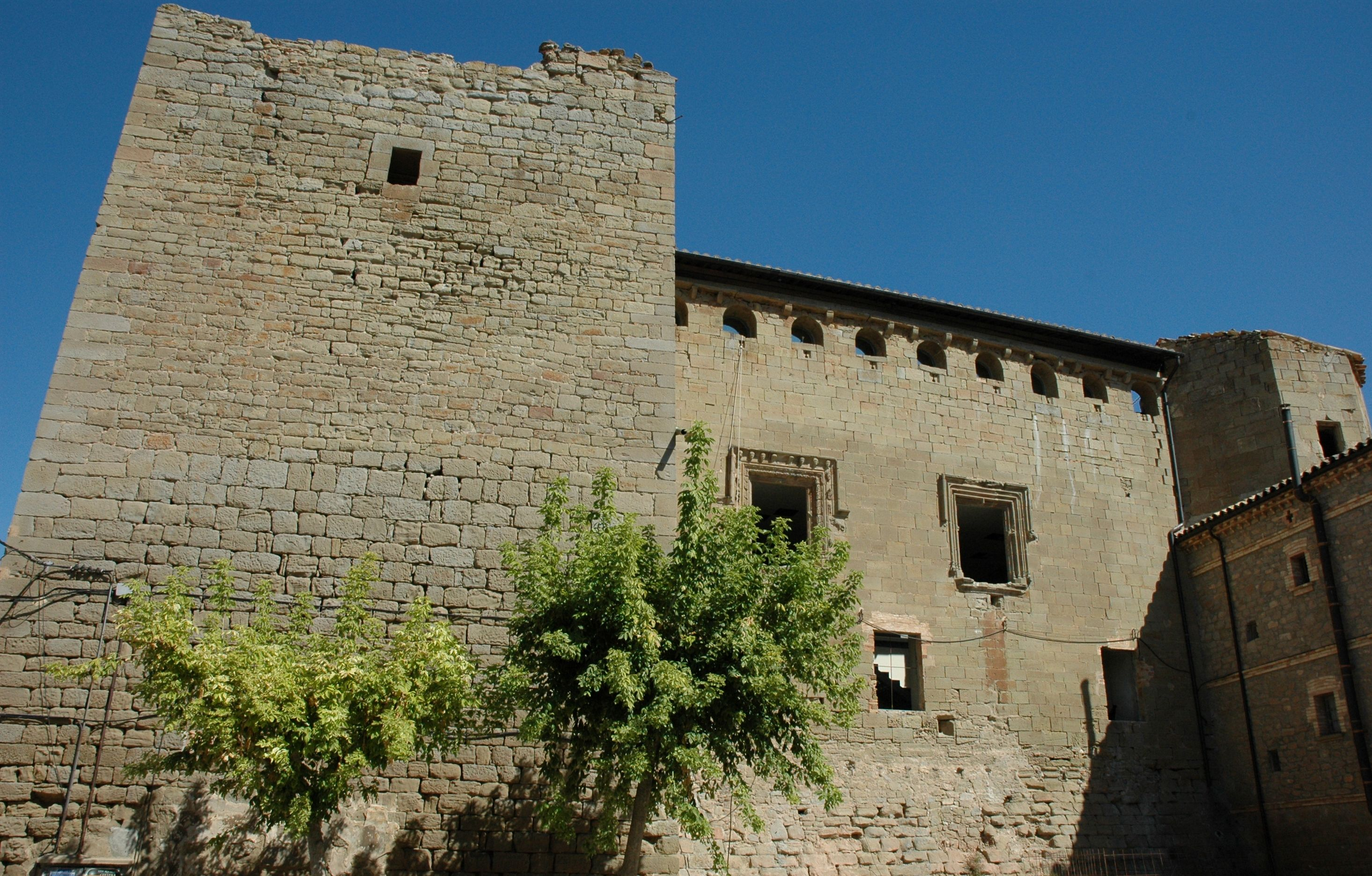 Castell de Concabella